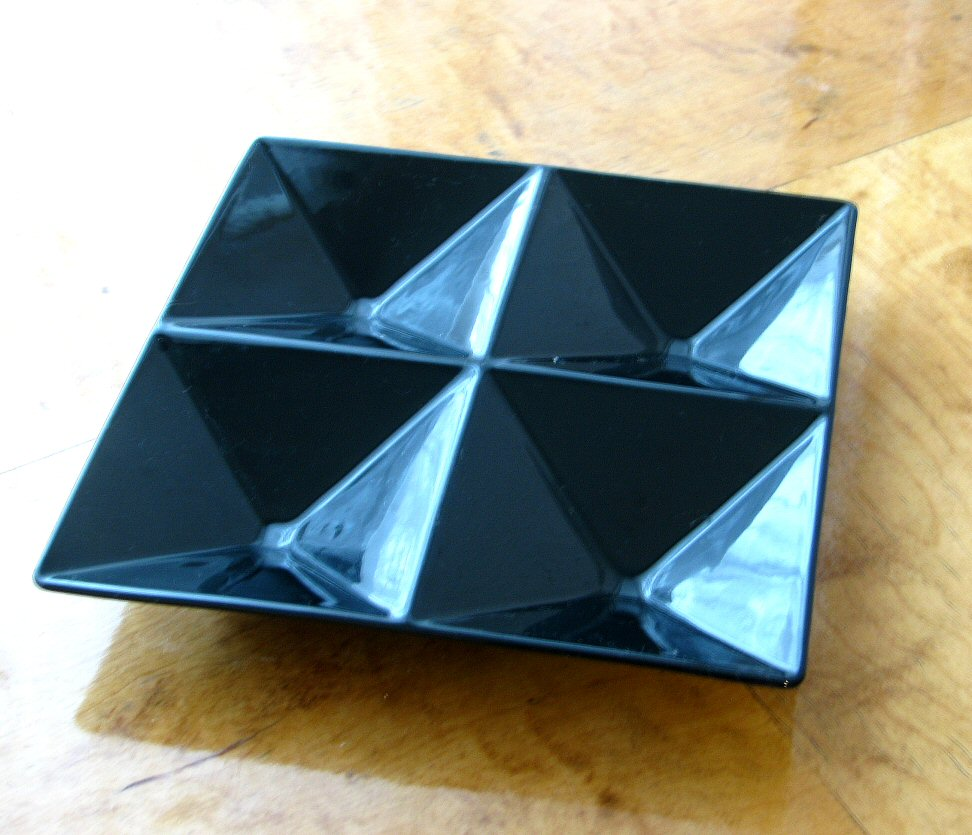 Kaj Franckin lokerovati 1957